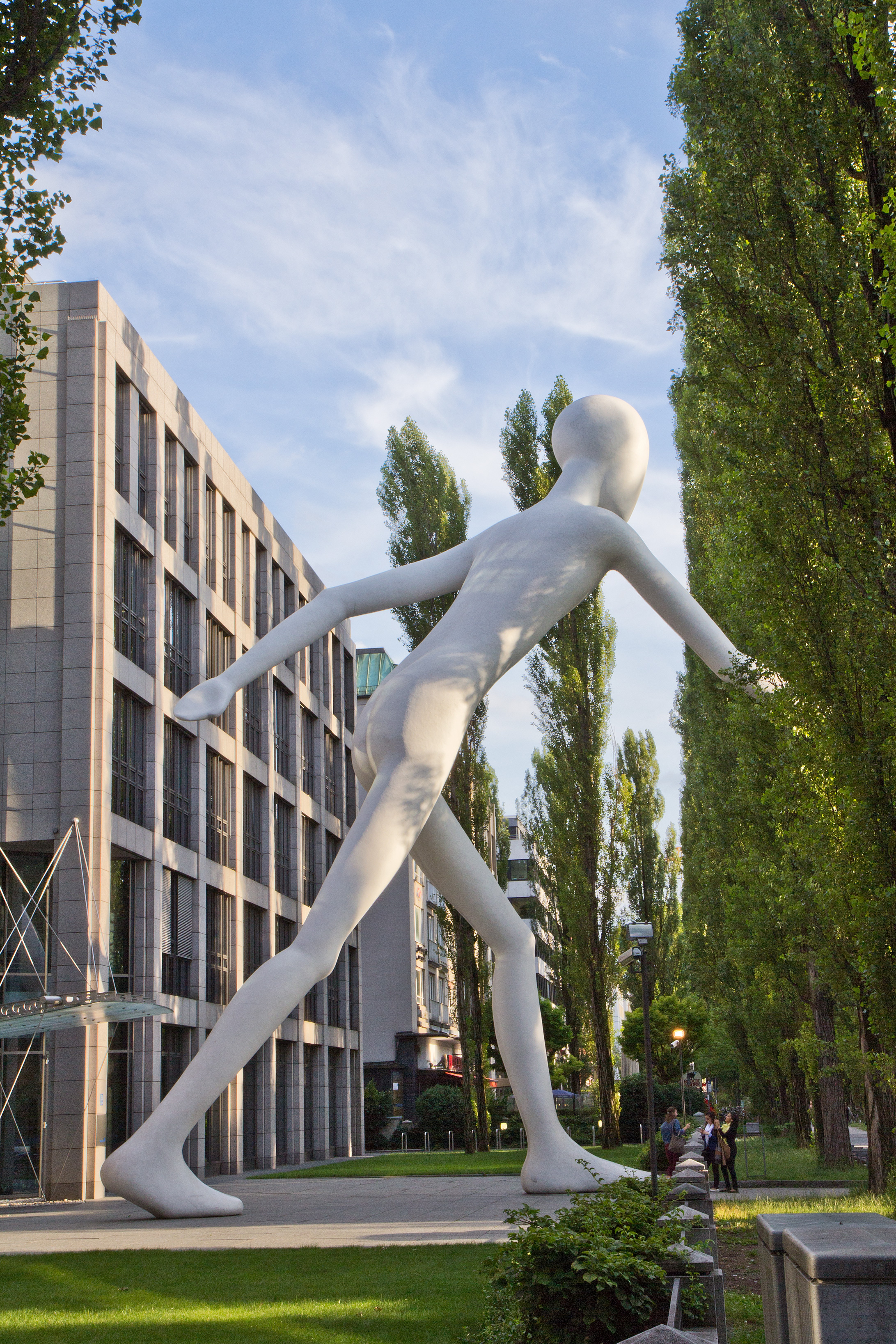 Wikipedia im Landtag – Bayern 17. bis 19. Juli 2012 in München Dieses Foto wurde im Rahmen des Projektes „Wikipedia im Landtag“ erstellt. Dieses Bild entstand anlässlich des Landtagsprojekts 2012 im Bayerischen Landtag. Der Walking Man vor der Münchner Rück in derLeopoldstraße in München-Schwabing.